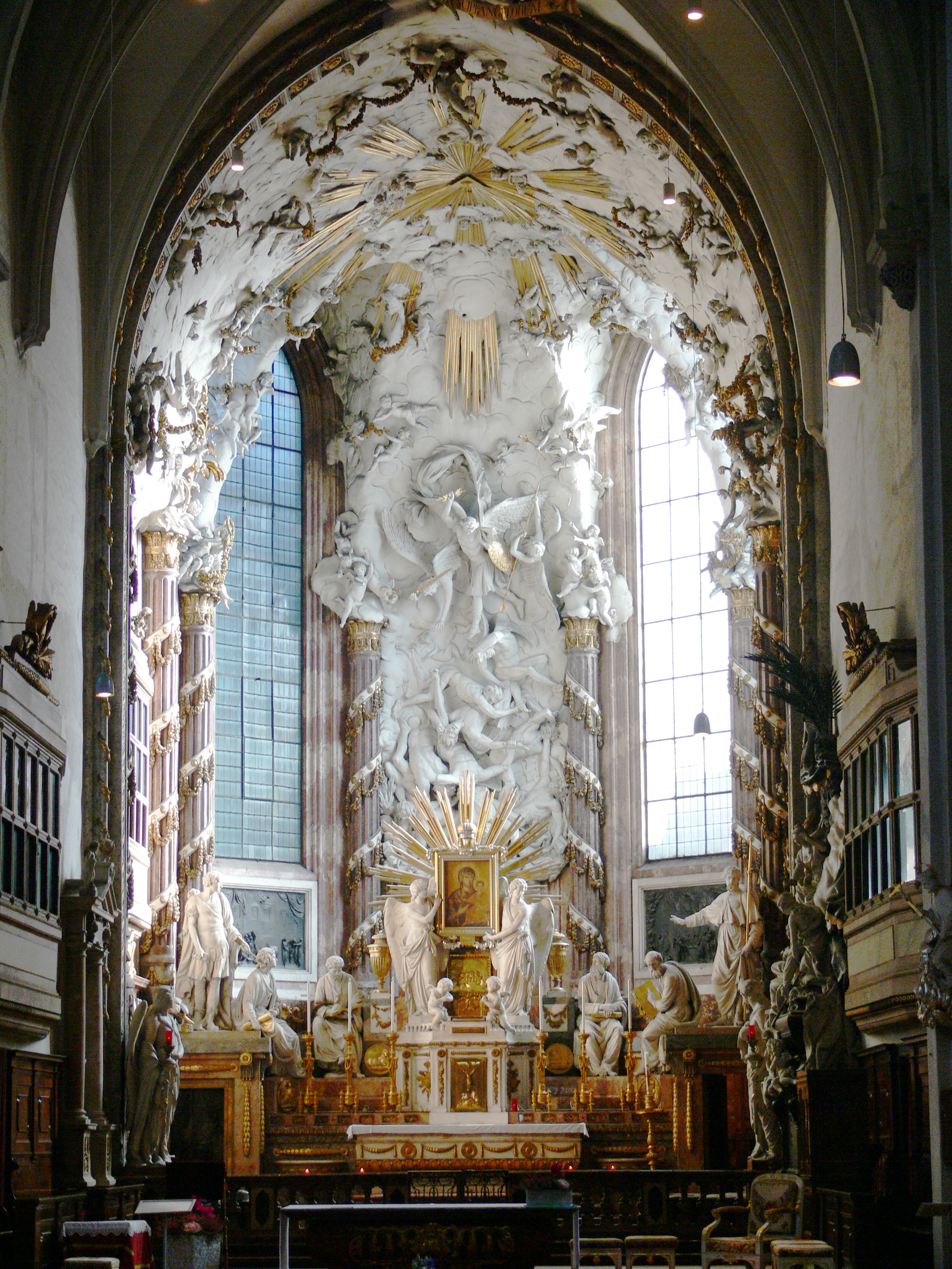 Wien, Michaelerkirche, Hochaltar